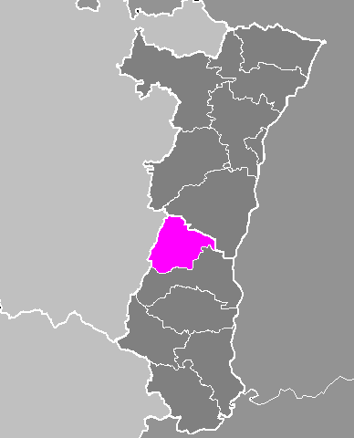 Maps of arrondissements and cantons of France: Arrondissement de Ribeauvillé.PNG (Région Alsace)